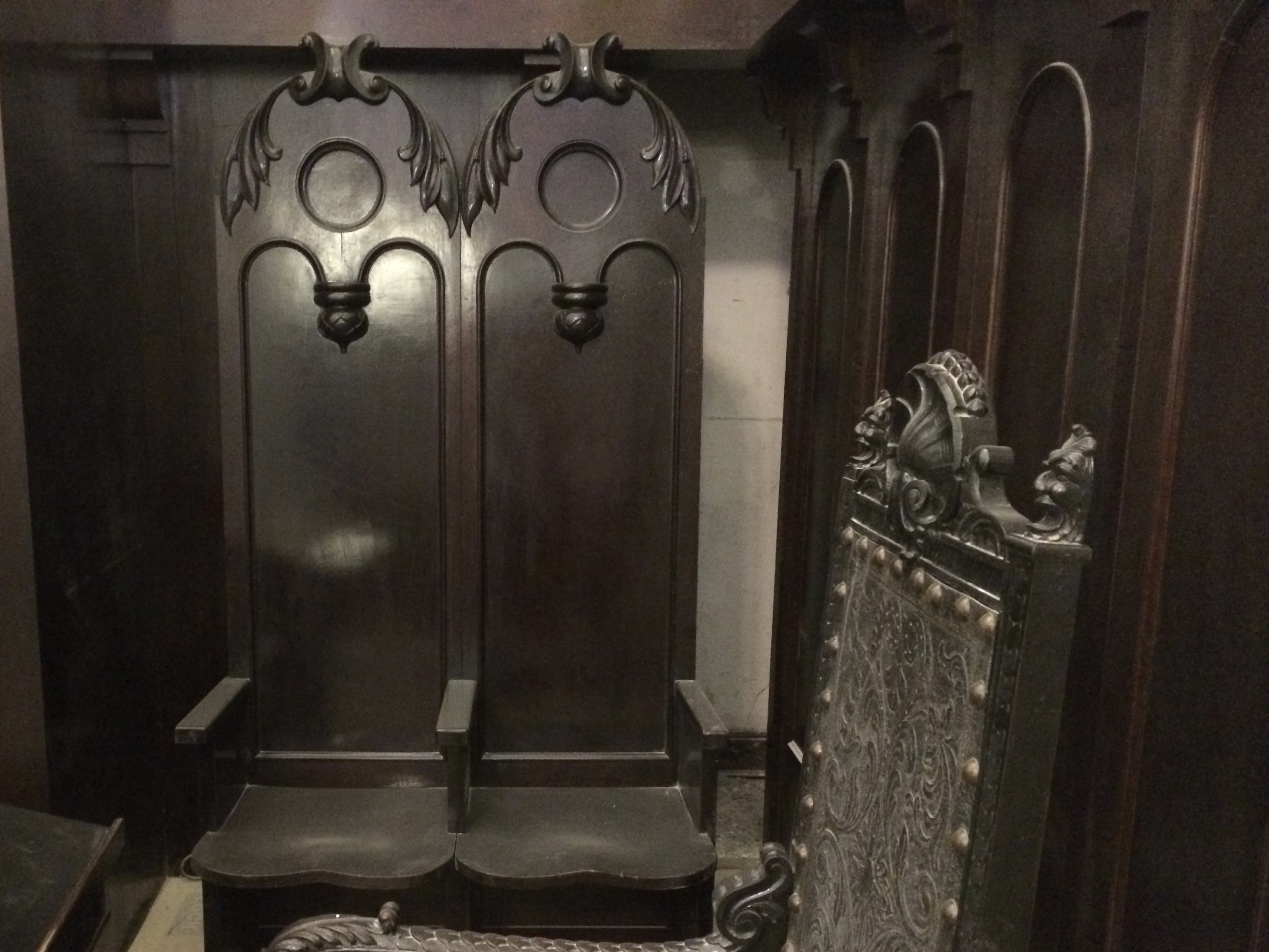 Altar do Salão Principal do Museu Judaico de São Paulo em obras, São Paulo (SP), Brasil